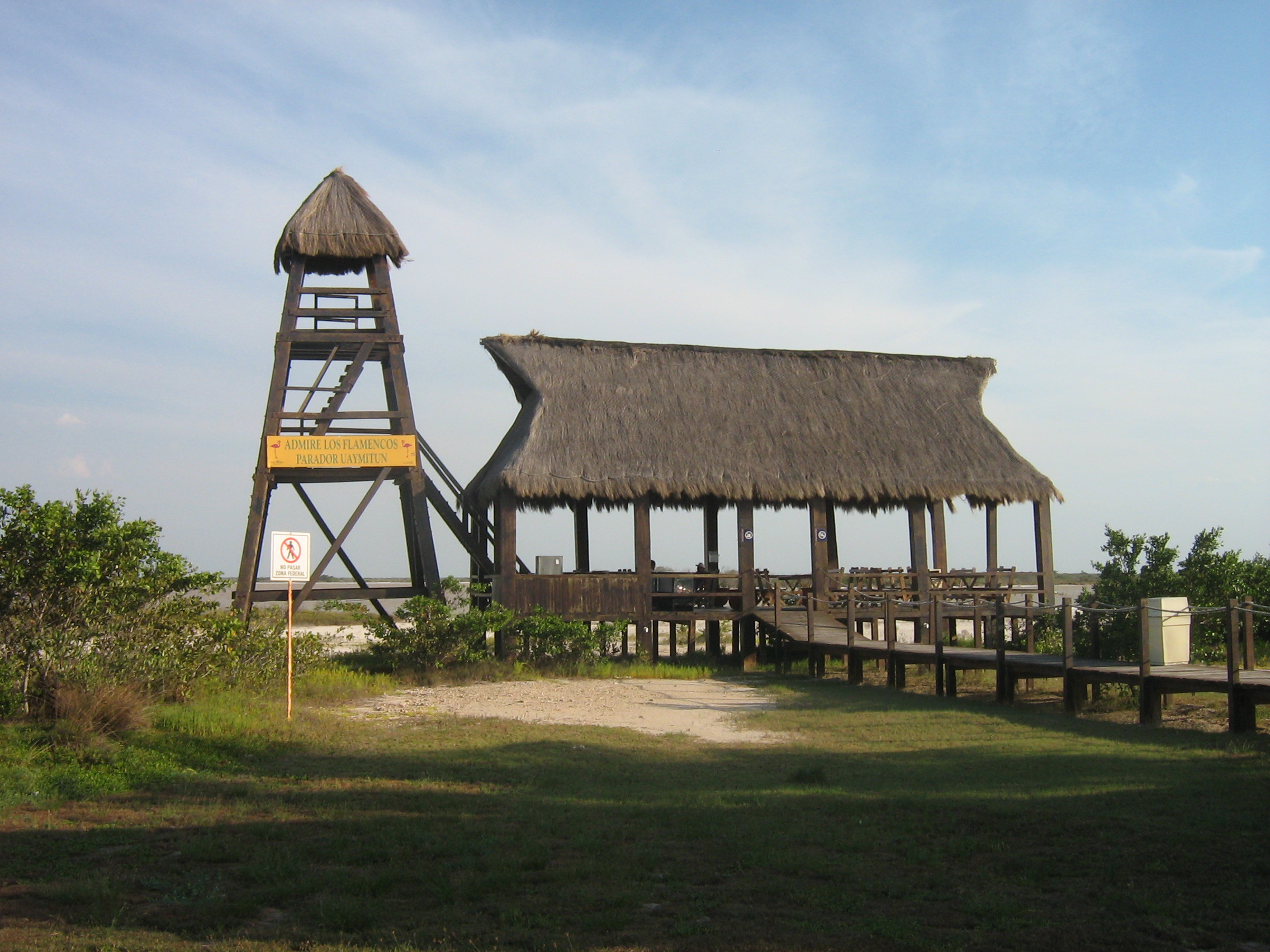 Mirador ecoturistico de Uaymitún, Yucatán,México